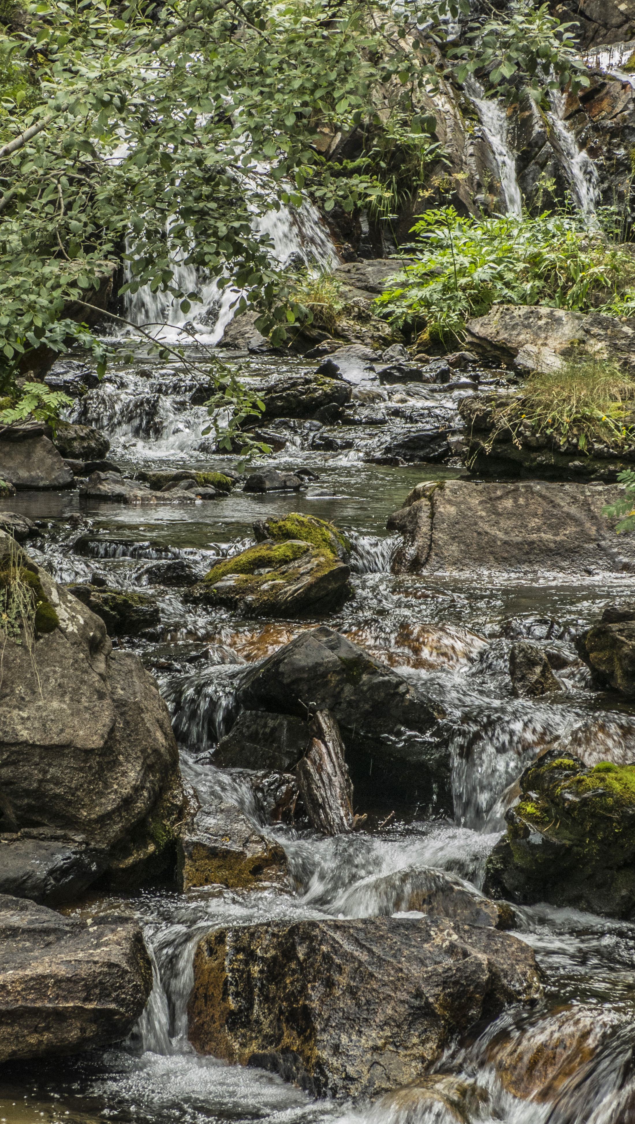 Barranc del riu Estós, afluent de l'Éssera, al Parc Natural de Pocets-Maladeta (Osca).